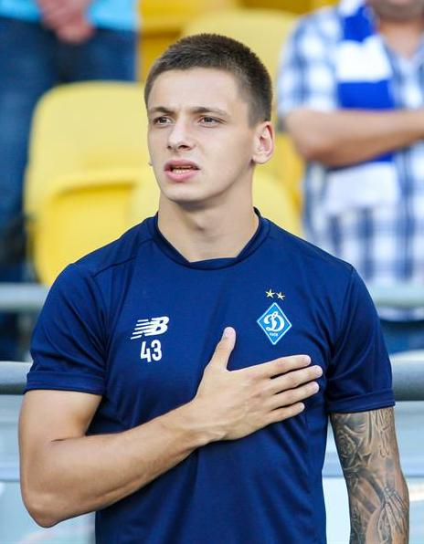 Назарій Русин - український футболіст, нападник.